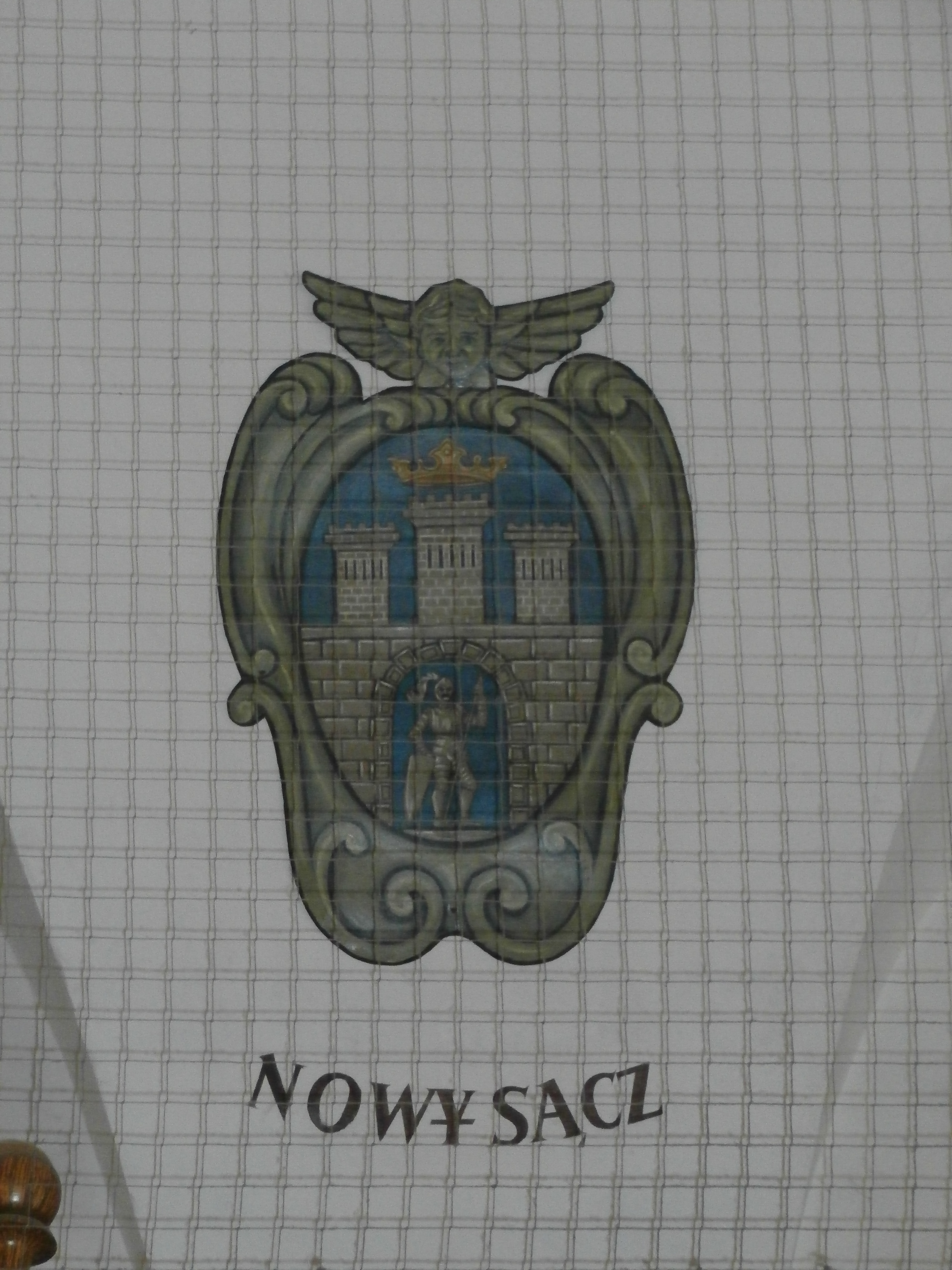 Stary Herb Nowego Sącza we wnętrzu Krakowskich Sukiennic.